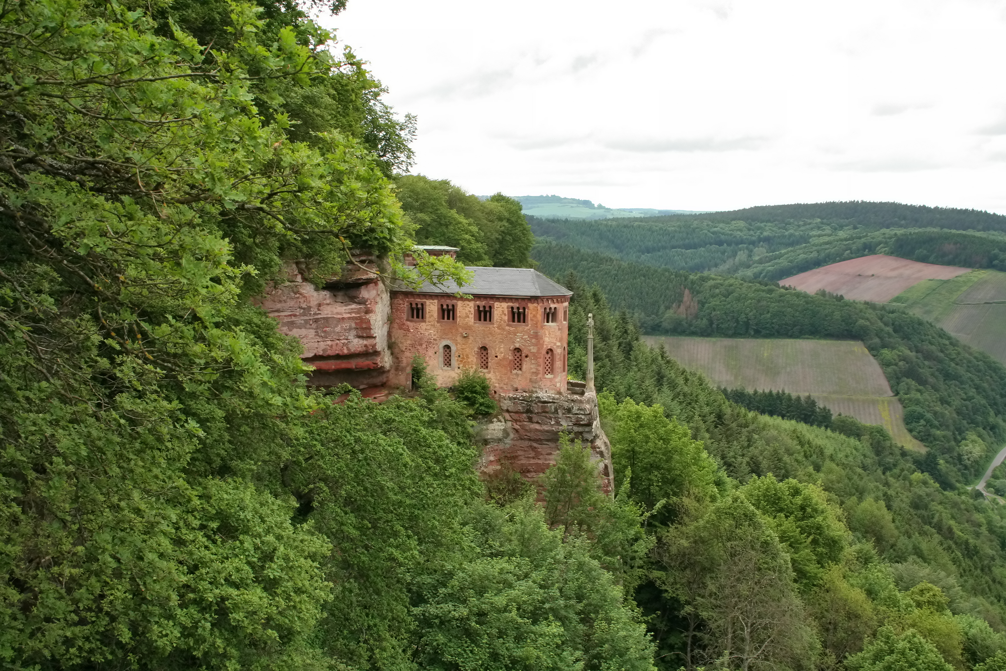 Ehemaliges Grab des Königs Johann von Böhmen und Graf von Luxemburg